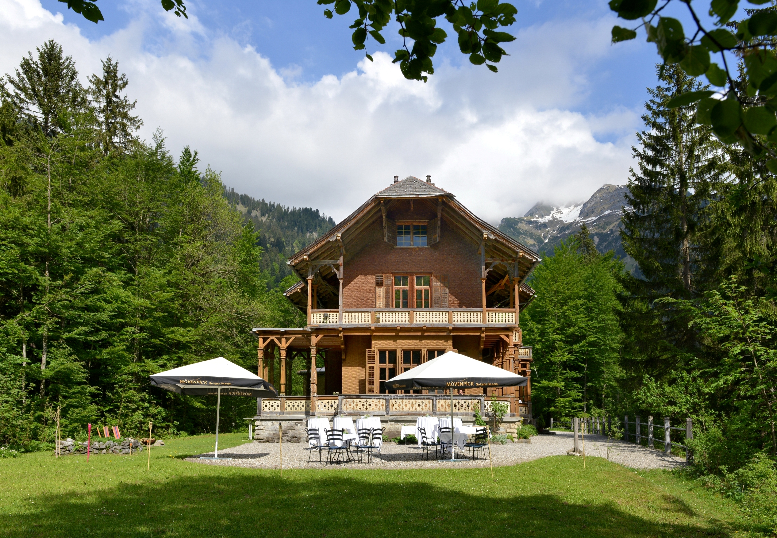 Die Villa Maund wurde 1895 als Jagdvilla im englischen Landhausstil vom Bankier Sir John Oakley Maund, auf dem Ausläufer der Ünschenberg Alp bei Hinterhopfreben erbaut. Im Bild die Westansicht mit Heiterberg. Architekt:William Morris, der Vater der Arts-and-Crafts-Bewegung und Gestalter der Morris Rooms im Victoria and Albert Museum in London; Zimmermannsarbeiten: Johann Anton Strolz aus Schröcken; Innenausbau:Kunsttischler Kaspar Felder.